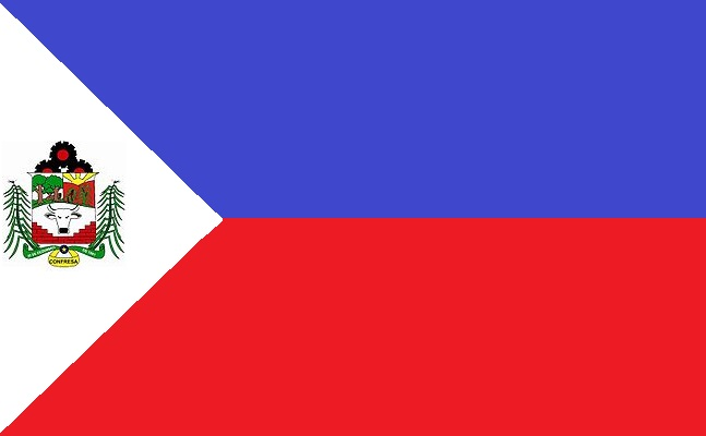 Bandeira do município de Confresa Mato Grosso